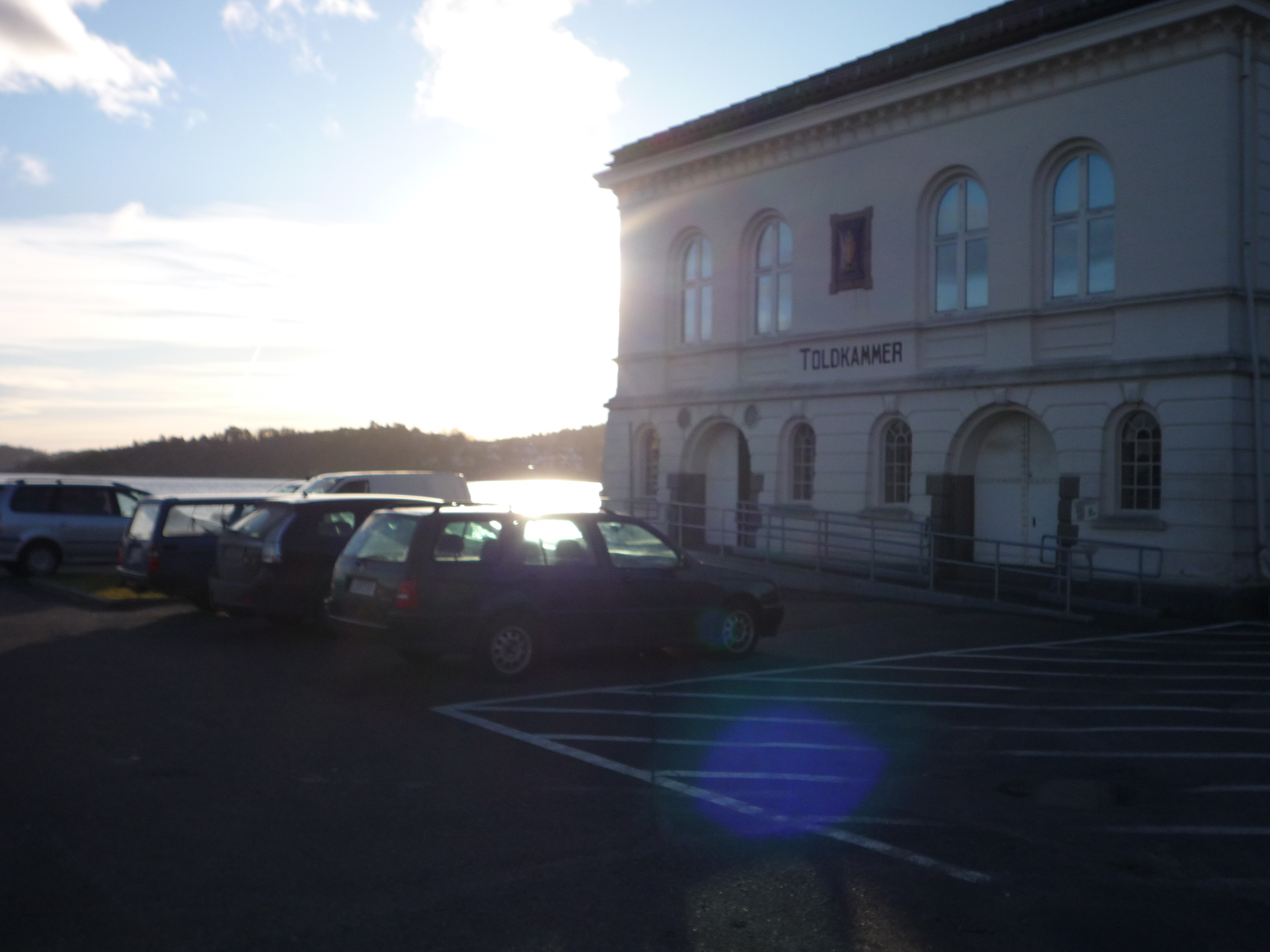 Tollboden. Høgskolen i Vestfolds node i Larvik